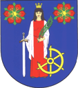 Wappen von Kateřinice Česky: znak obce Kateřinice